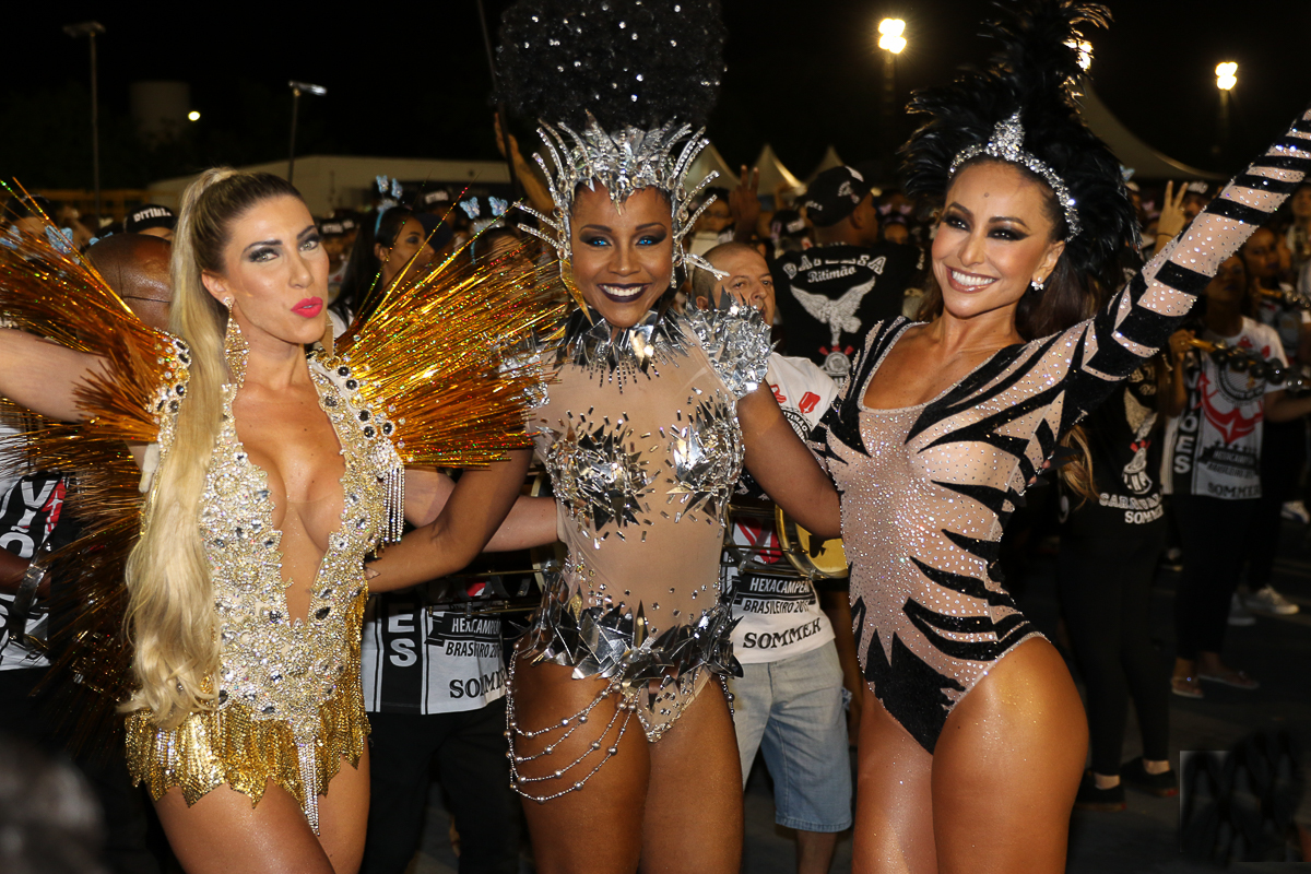 Gaviões da Fiel